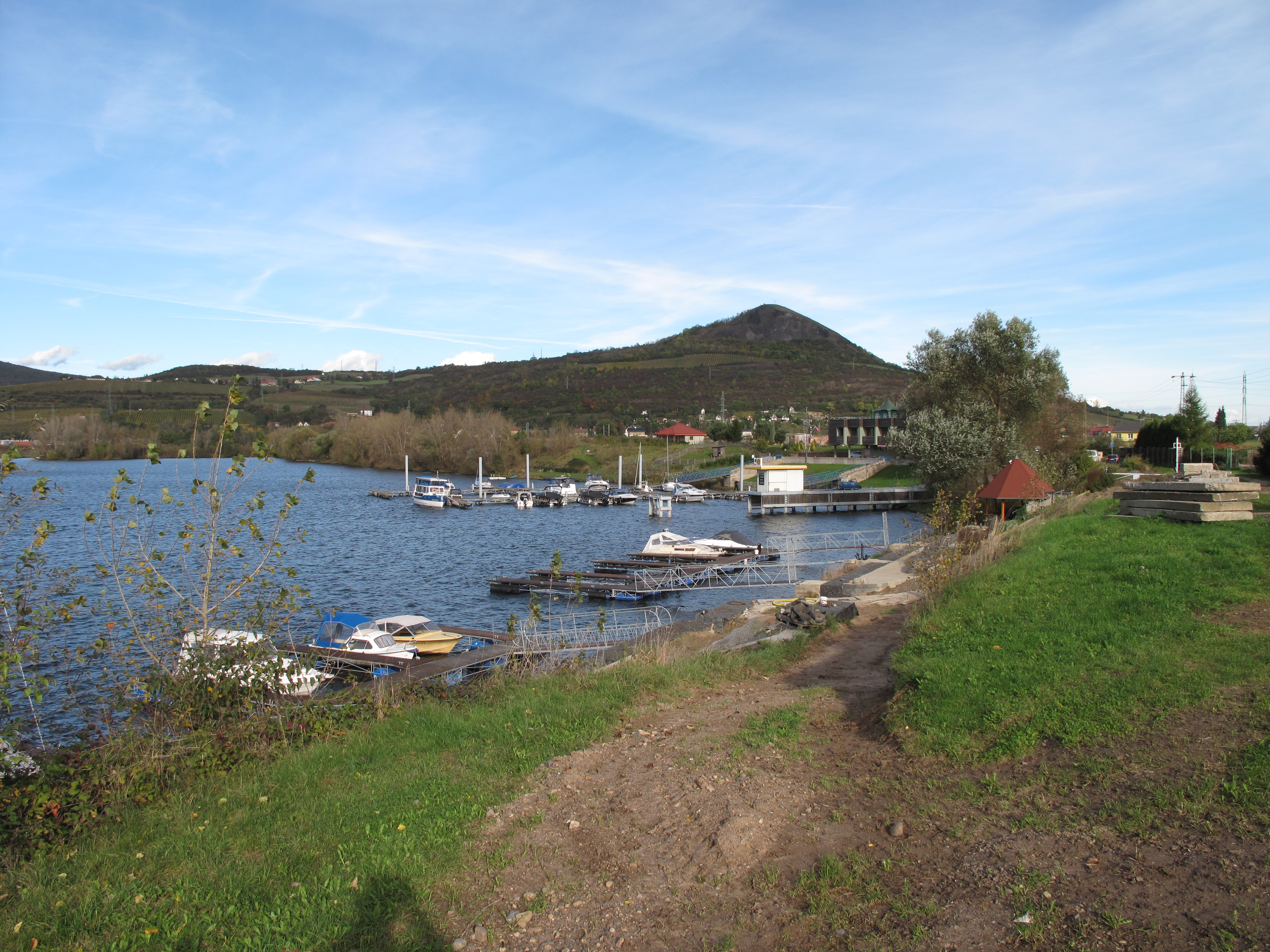 Přístav na Žernoseckém jezeře. Okres Litoměřice, Česká republika.